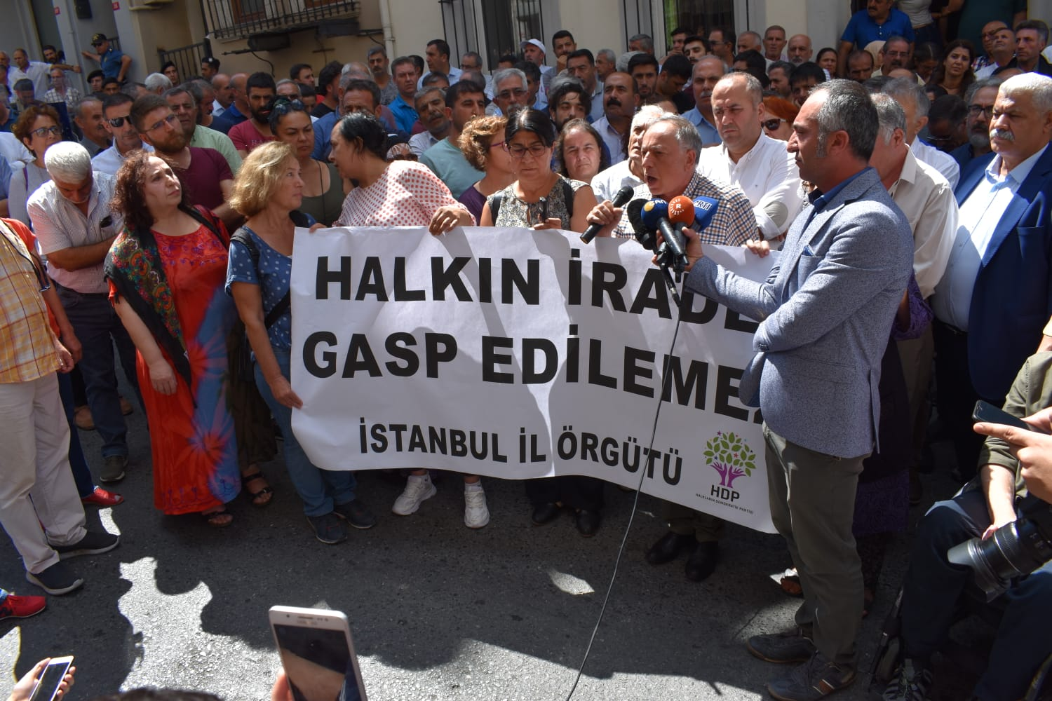 İstanbul kayyım protestosu